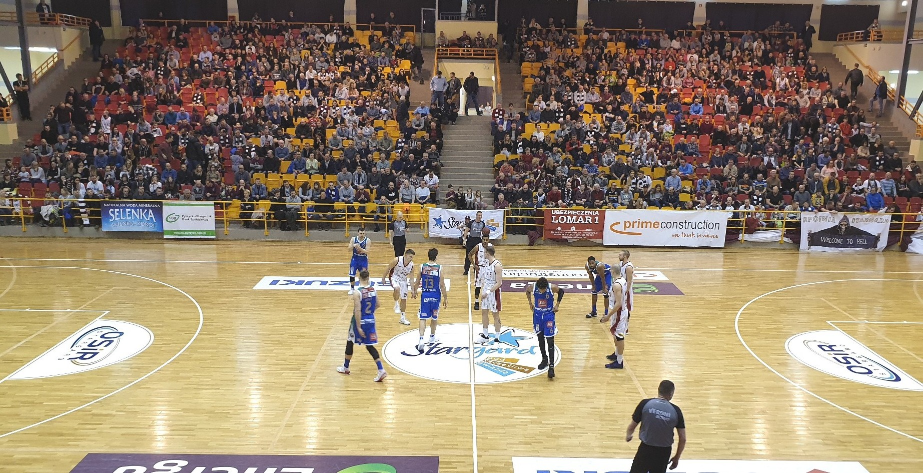 Spójnia Anwil 02.03.2019